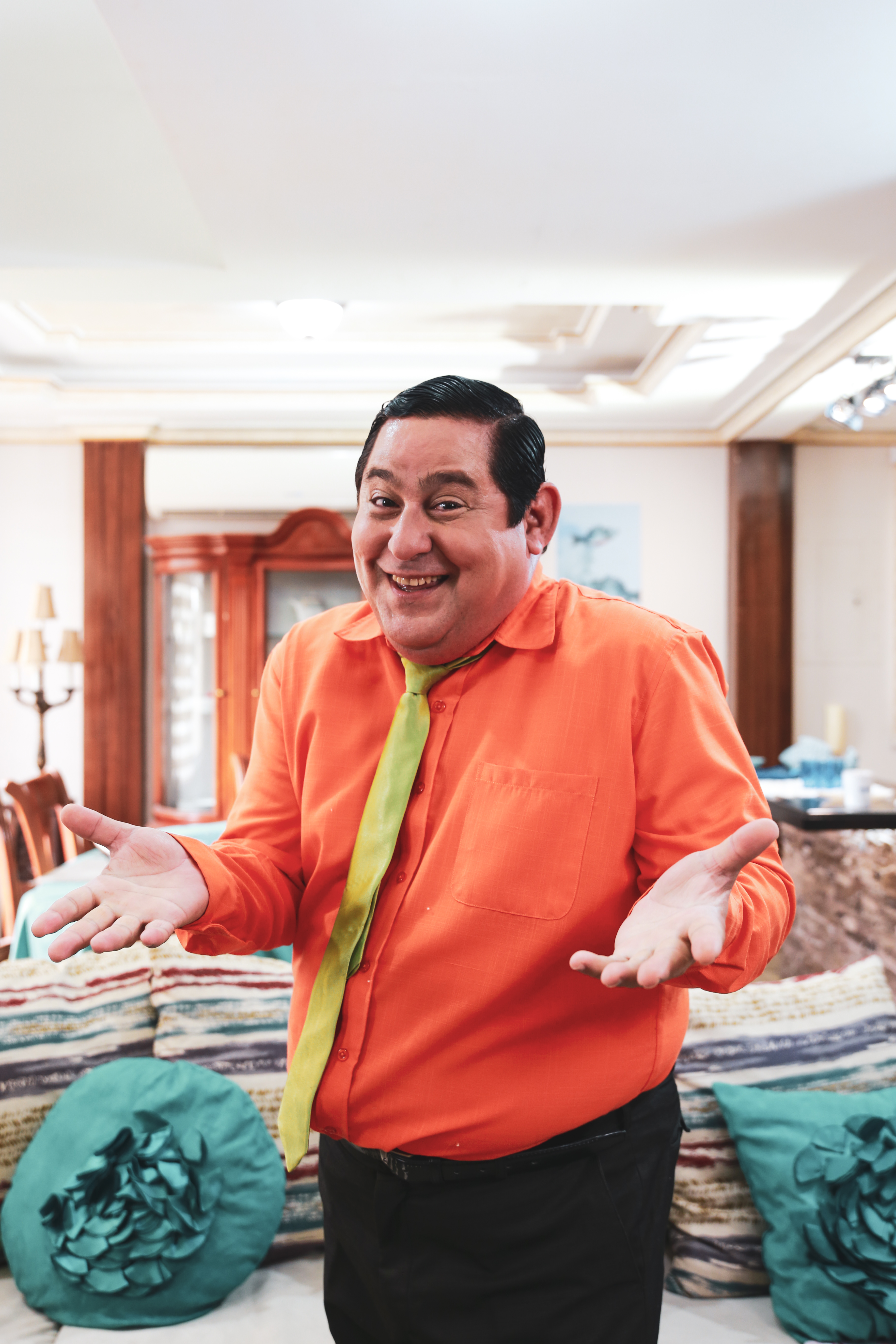 Jaime Roca interpretando a Pedrito el Mandarina, en el set de grabación de Amo de casa, de RTS, en 2019.